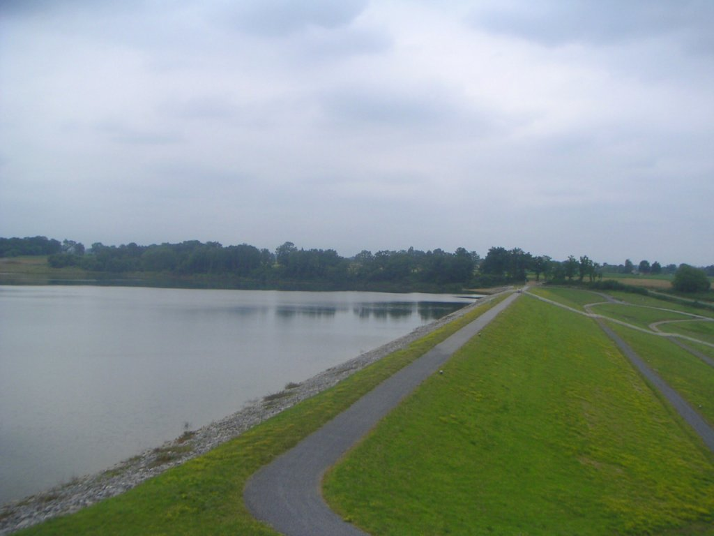 Lac de Gabas